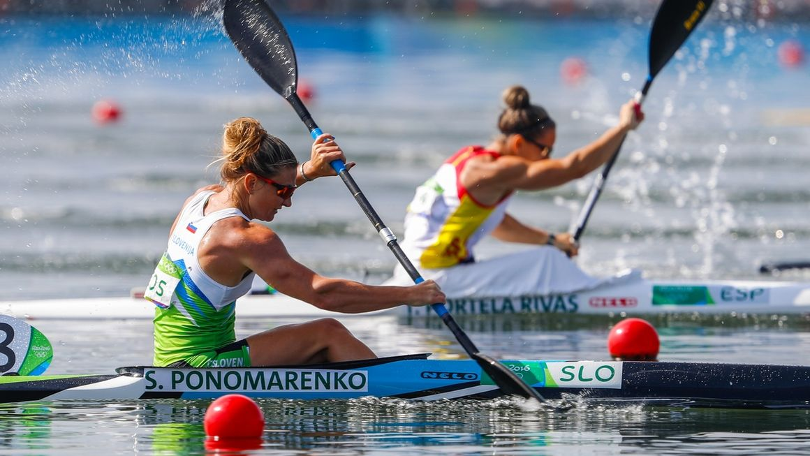 Špela Ponomarenko